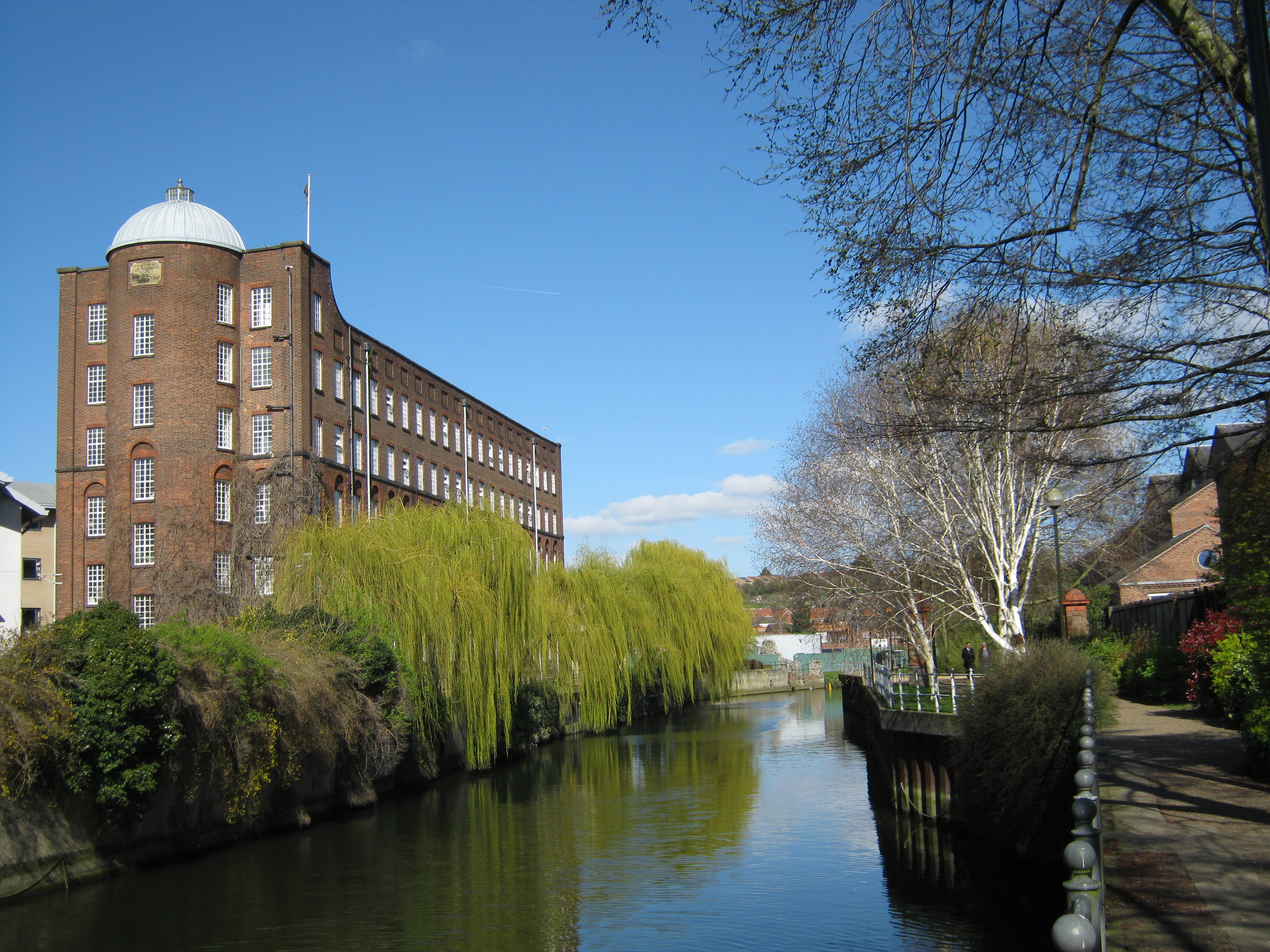 St. James Mill, Norwich.